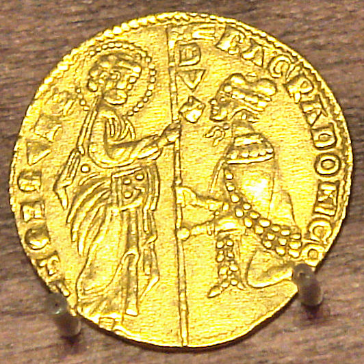 Bartolomeo Gradonico Gold Coin (ducato)